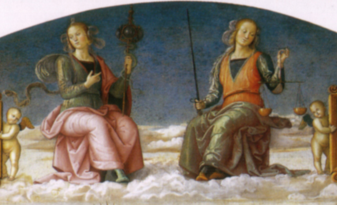 Raffigurazione delle virtù della Prudenza e della Giustizia (dettaglio)